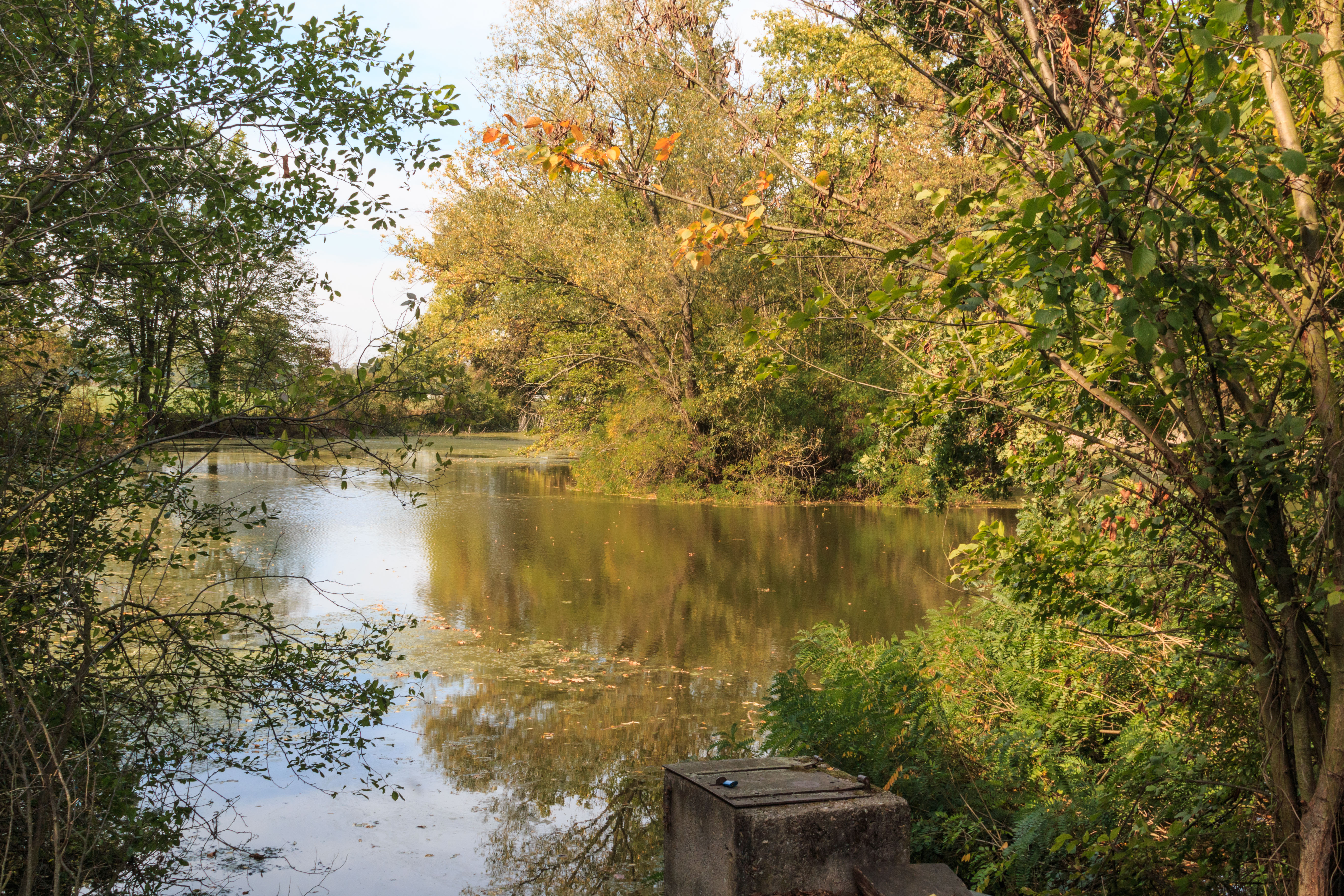 Cihlářův rybník u Kladrub nad Labem Project: Vodstvo